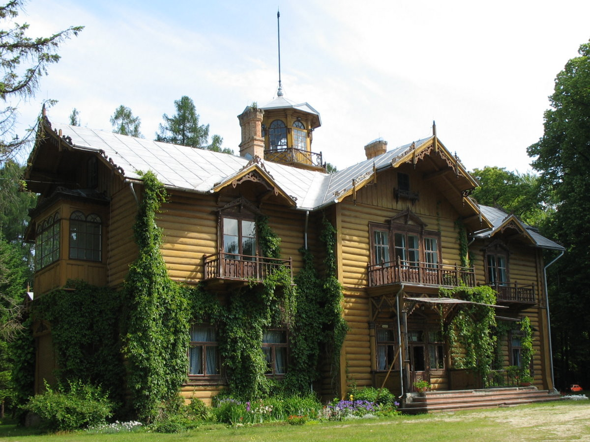 Julin (Polska) - drewniany pałacyk myśliwski Potockich z 1880 r.